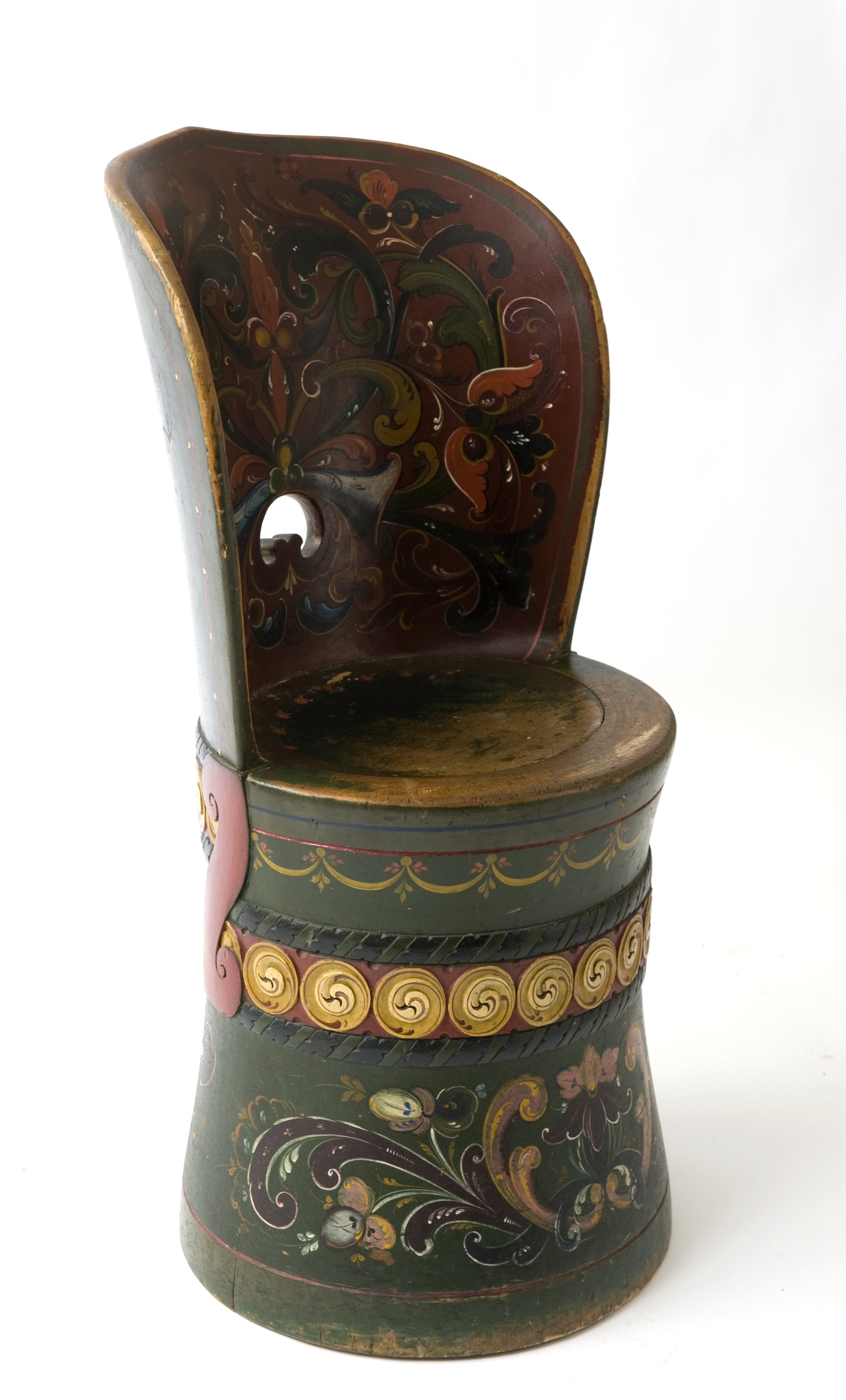 Kubbestol skåret og malt i 1920 av Olav Fyrlileiv (1875-1975), Heddal i Telemark.